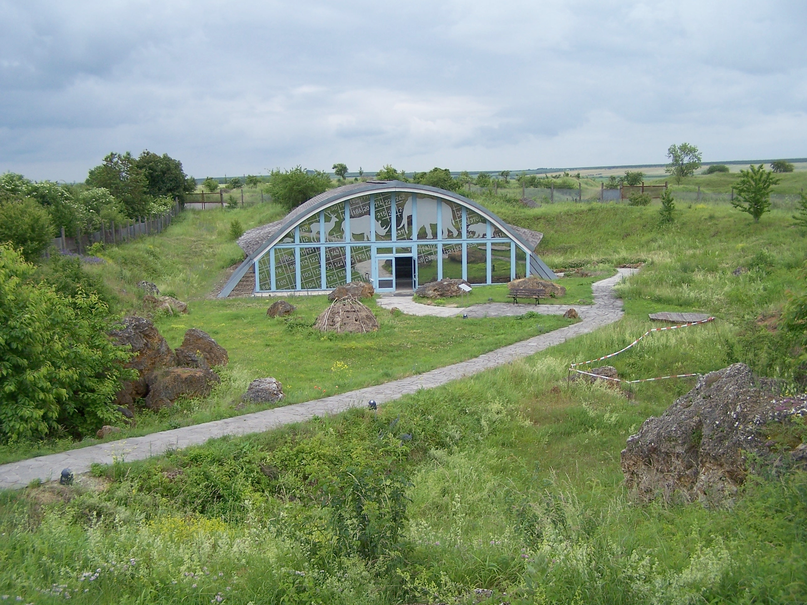 Das filigrane, überwiegend aus Holz und Glas erbaute Museumsgebäude am archäologischen Fundplatz Bilzingsleben erhielt 2009 den Thüringer Holzbaupreis.